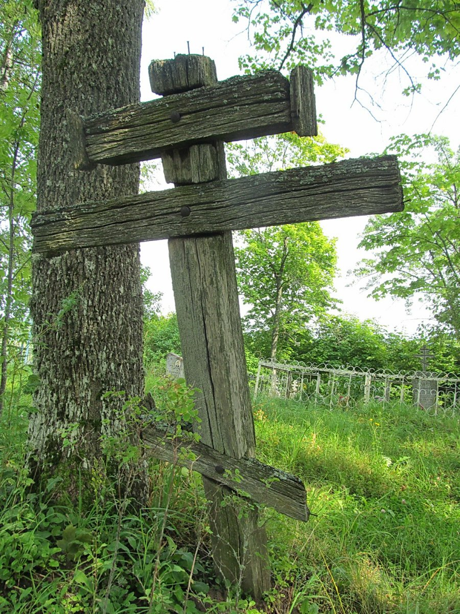 Ніўнікі. Могілкі